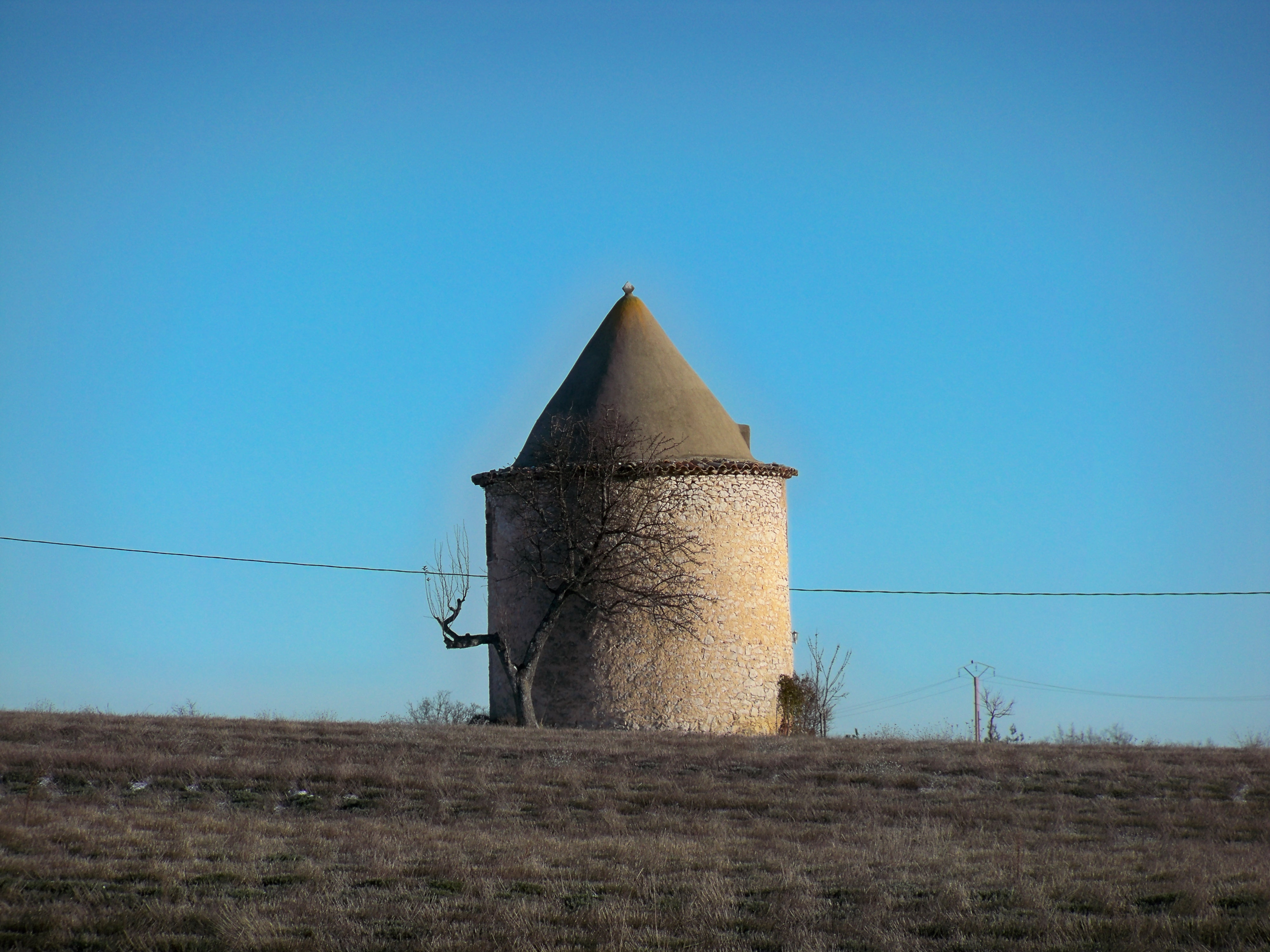 Tour proche de Revest-du-Bion (04)